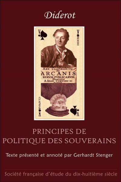 L'oeuvre de Diderot connue sous le titre Principes de politique des souverains ne laisse pas d'intriguer depuis sa première publication par Naigeon en 1798. La découverte récente de la source à partir de laquelle Diderot a composé une grande partie de ses maximes prétendument tirées de Tacite - l'ouvrage De arcanis Rerumpublicarum libri sex du savant allemand Arnoldus Clapmarius publié en 1605 - a permis de lever le voile sur la genèse et la composition des Principes. Si l'édition procurée par Naigeon en 1798 restitue probablement le mieux les convictions politiques les plus profondes de Diderot, le texte de la copie de Leningrad, destiné à Catherine II, porte les traces du projet original de 1774 : présenté comme des Notes écrites de la main d'un souverain à la marge de Tacite, il vibre de l'indignation d'un souverain éclairé vis-à-vis des forfaits rapportés par l'historien romain. L'édition présente révèle les passages du De arcanis qui ont servi à Diderot pour composer un grand nombre de ses maximes, et donne pour la première fois une transcription correcte du manuscrit de Leningrad. Elle permet désormais de saisir l'oeuvre dans son devenir légitime, peu avant la mort de l'auteur, et d'exclure son devenir posthume.